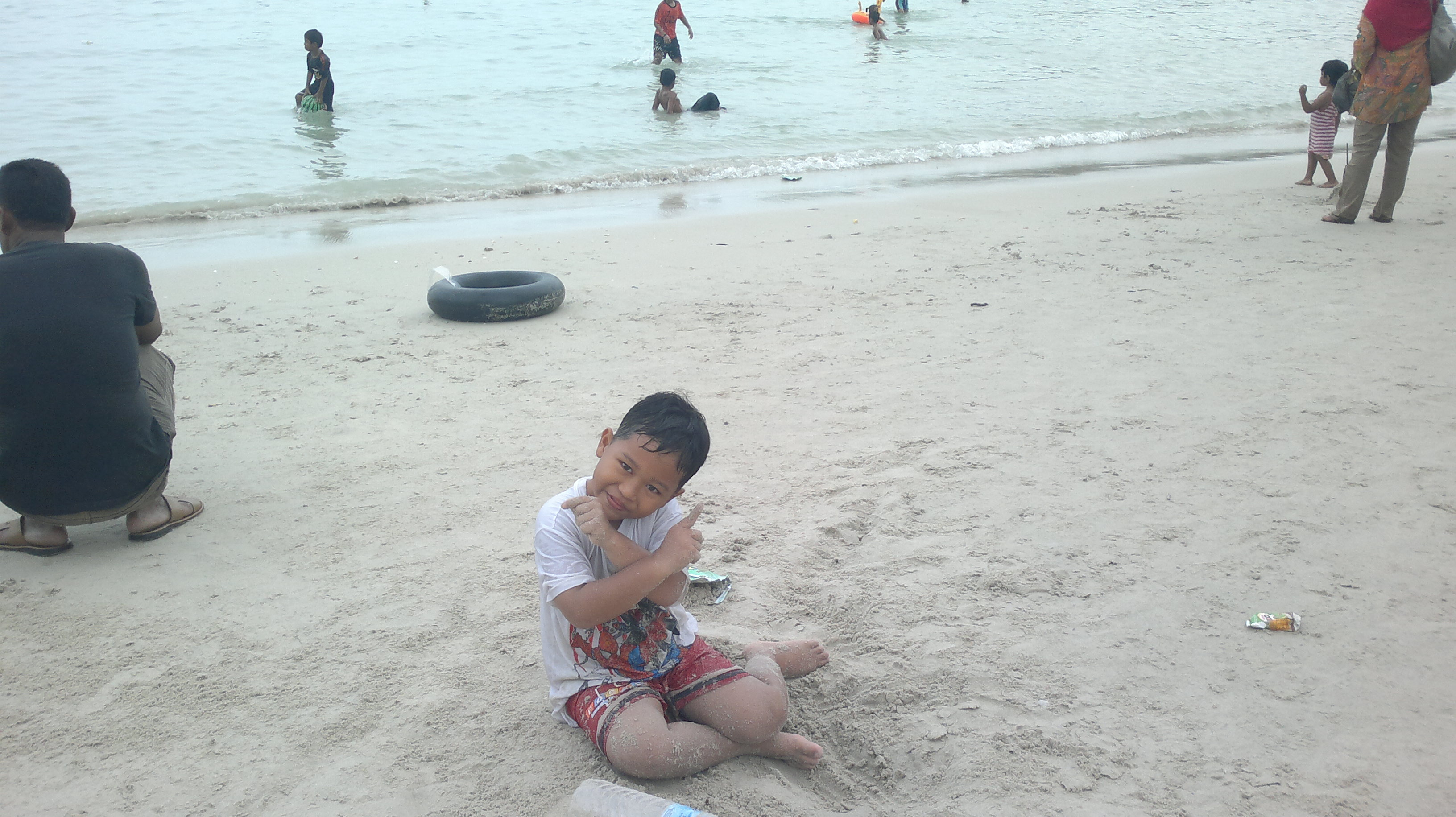 Wisata Pasir Panjang di Daik, Lingga